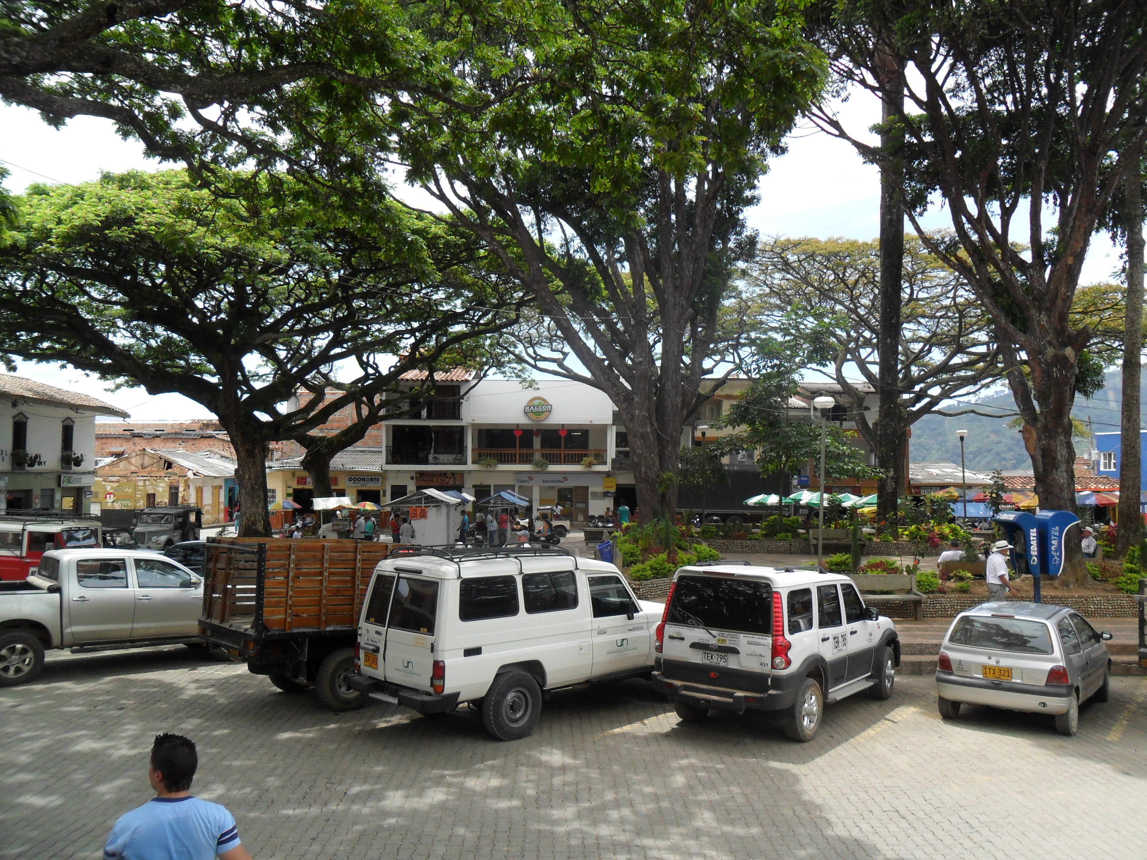 Vista del parque principal del municipio de Betania (Antioquia), visto desde el atrio de su iglesia. Se aprecia en el centro de la imagen una camioneta de la Universidad Nacional de Colombia, sede Medellín, que junto a Corantioquia, mantiene en Betania una Reserva Regional Forestal: Farallones del Citará